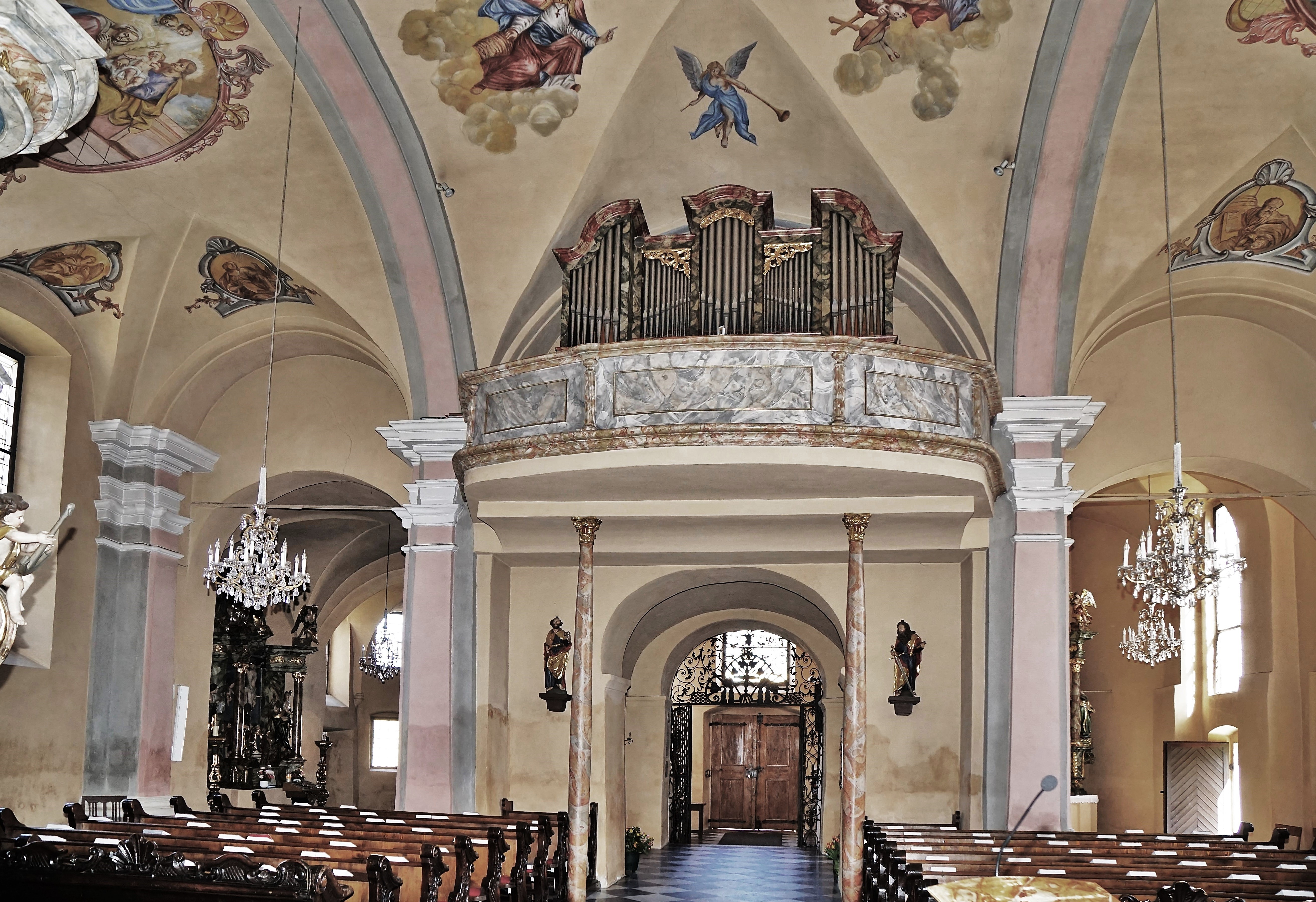 Kath. Pfarrkirche Hll. Michael und Georg (Moosburg in Kärnten), Innenansicht gegen die Orgelempore